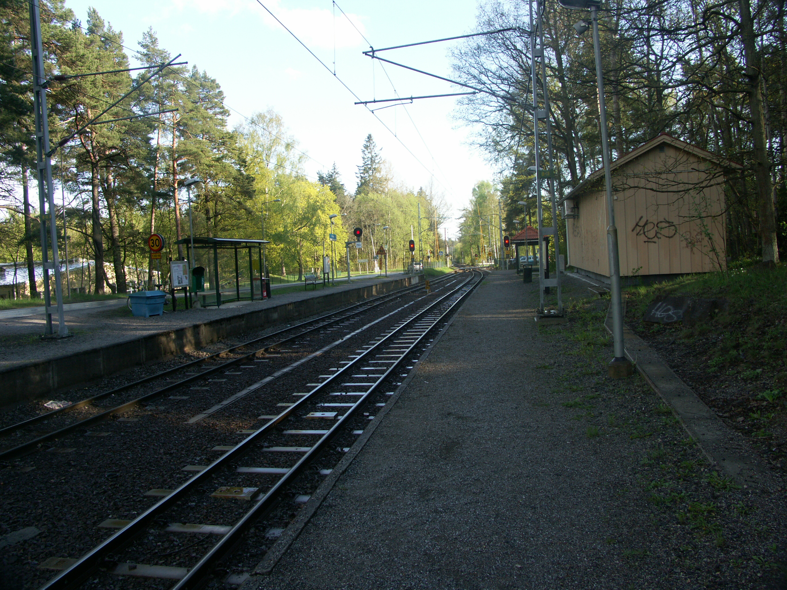 En bild från altorp tågstation